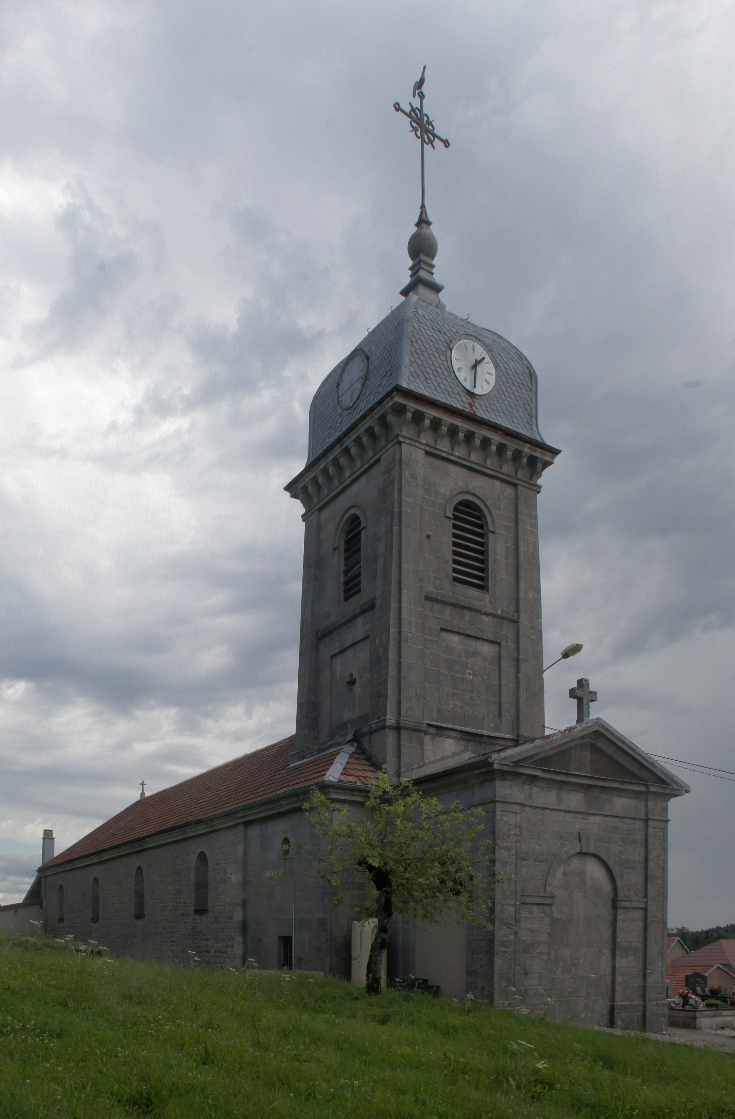 Église de Labergement-du-Navois (Doubs).